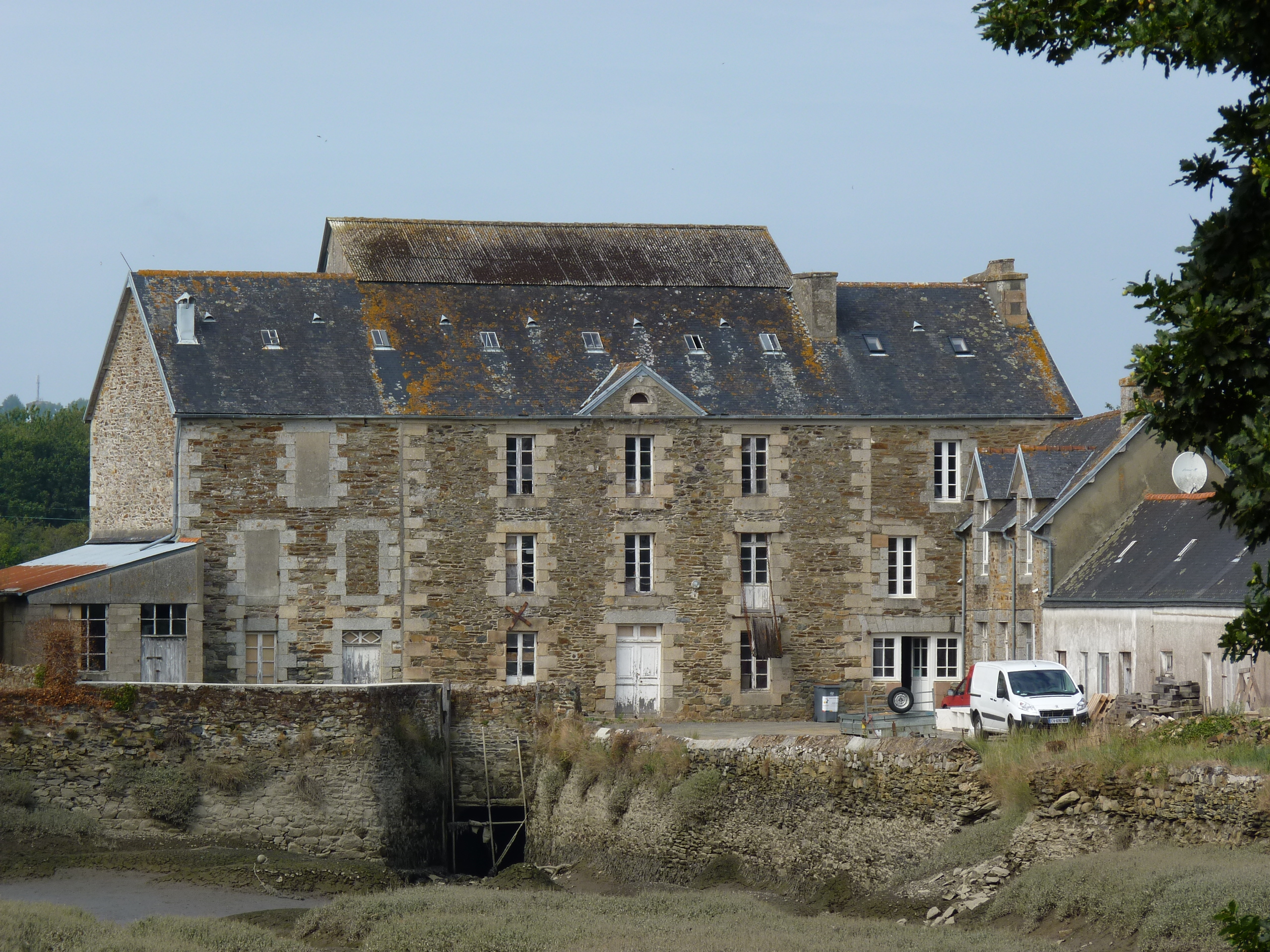 Moulin à marée. Minoterie.